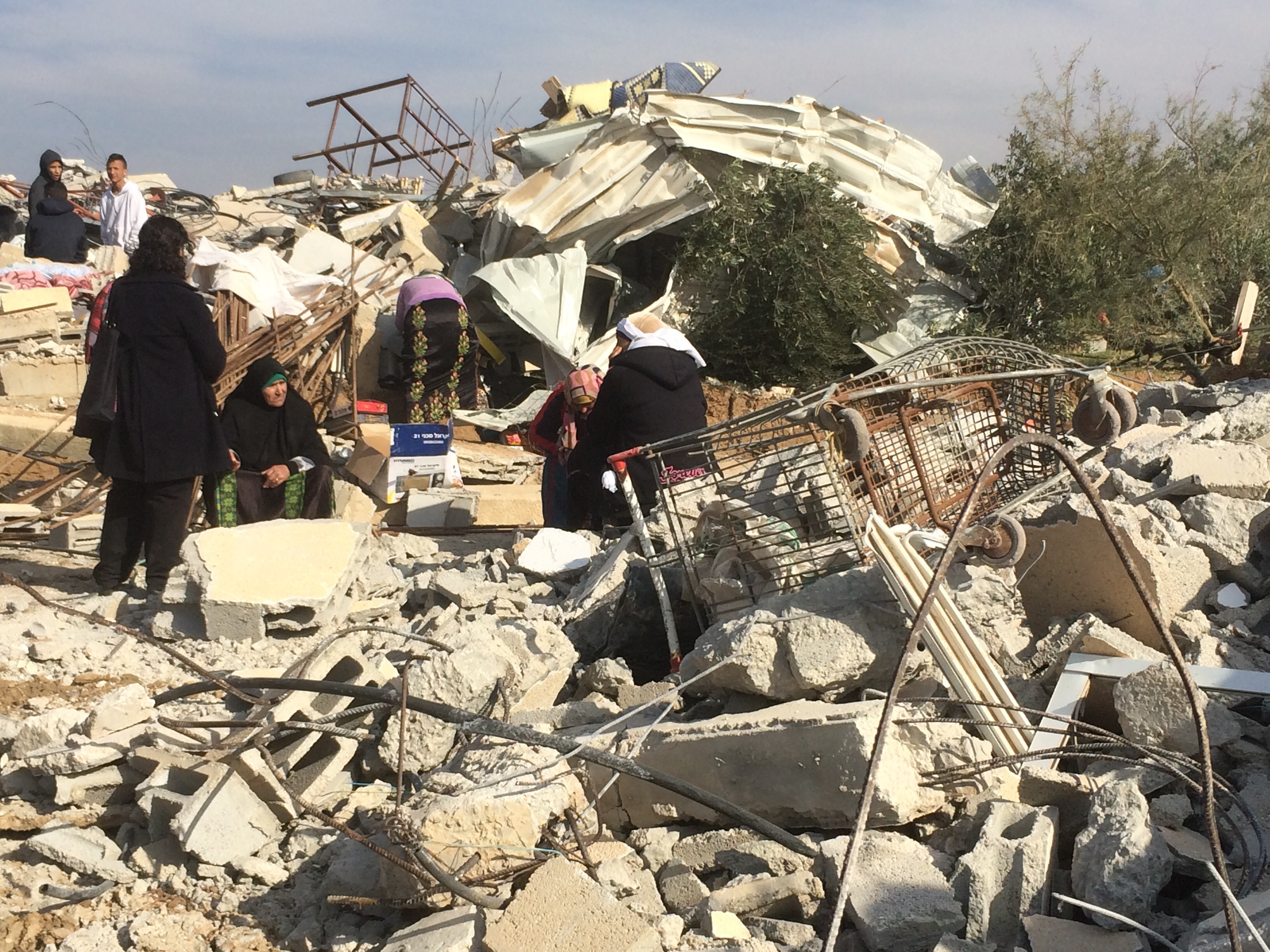 בתים הרוסים באום אל-חיראן